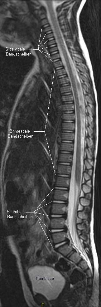 MRT der Wirbelsäule, Bandscheiben sind markiert